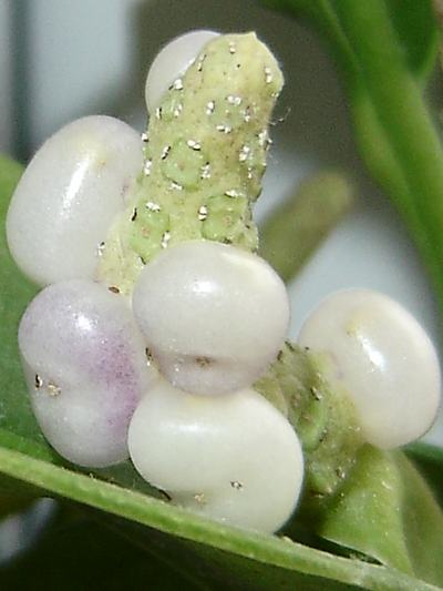 Anthurium scandens var. latifolium